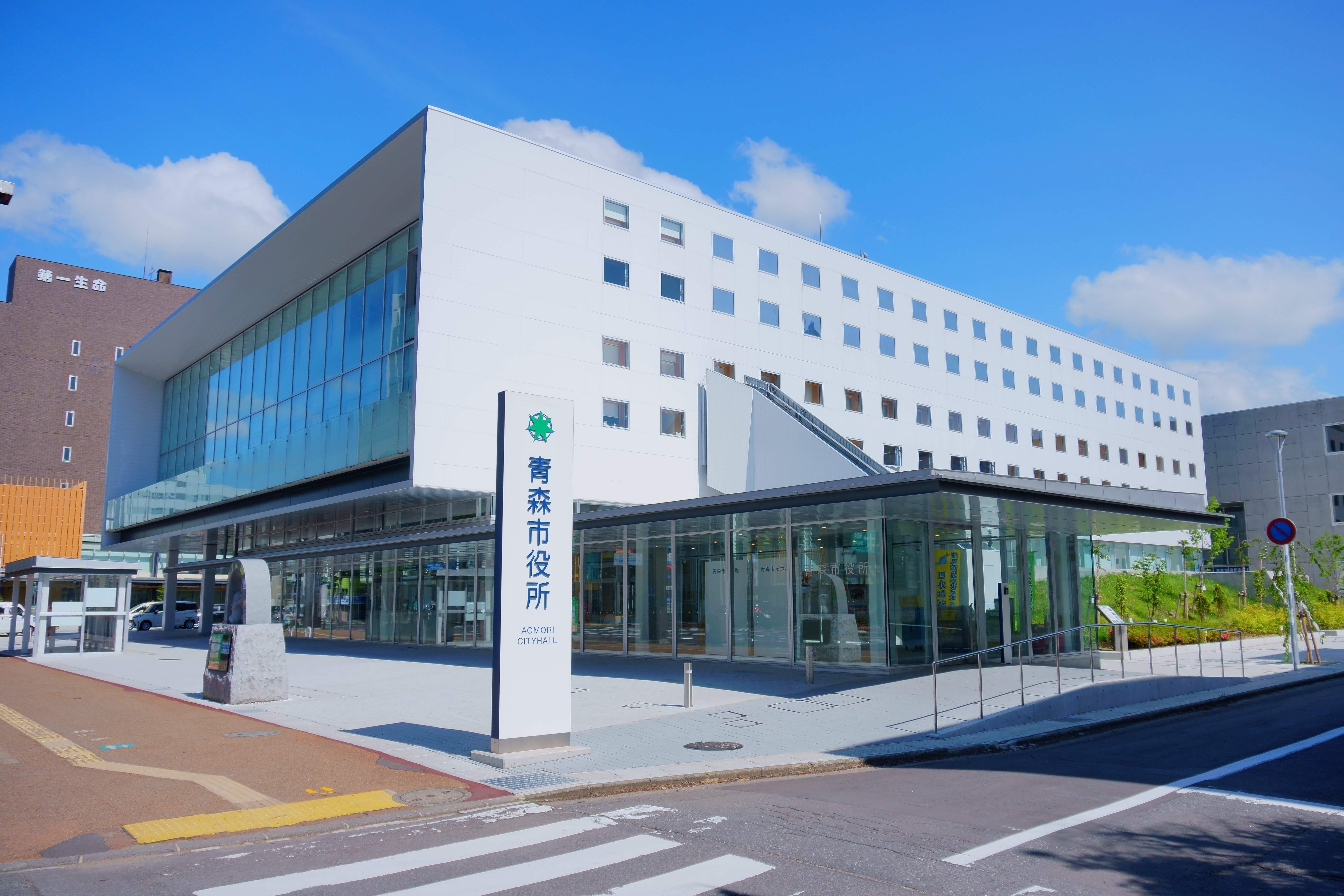 2019年に竣工した青森市役所新庁舎。窓口関係の部局は全て駅前庁舎（アウガ）に集約されたため、この庁舎には総務関係の部局と議場、議会事務局のみが入る。